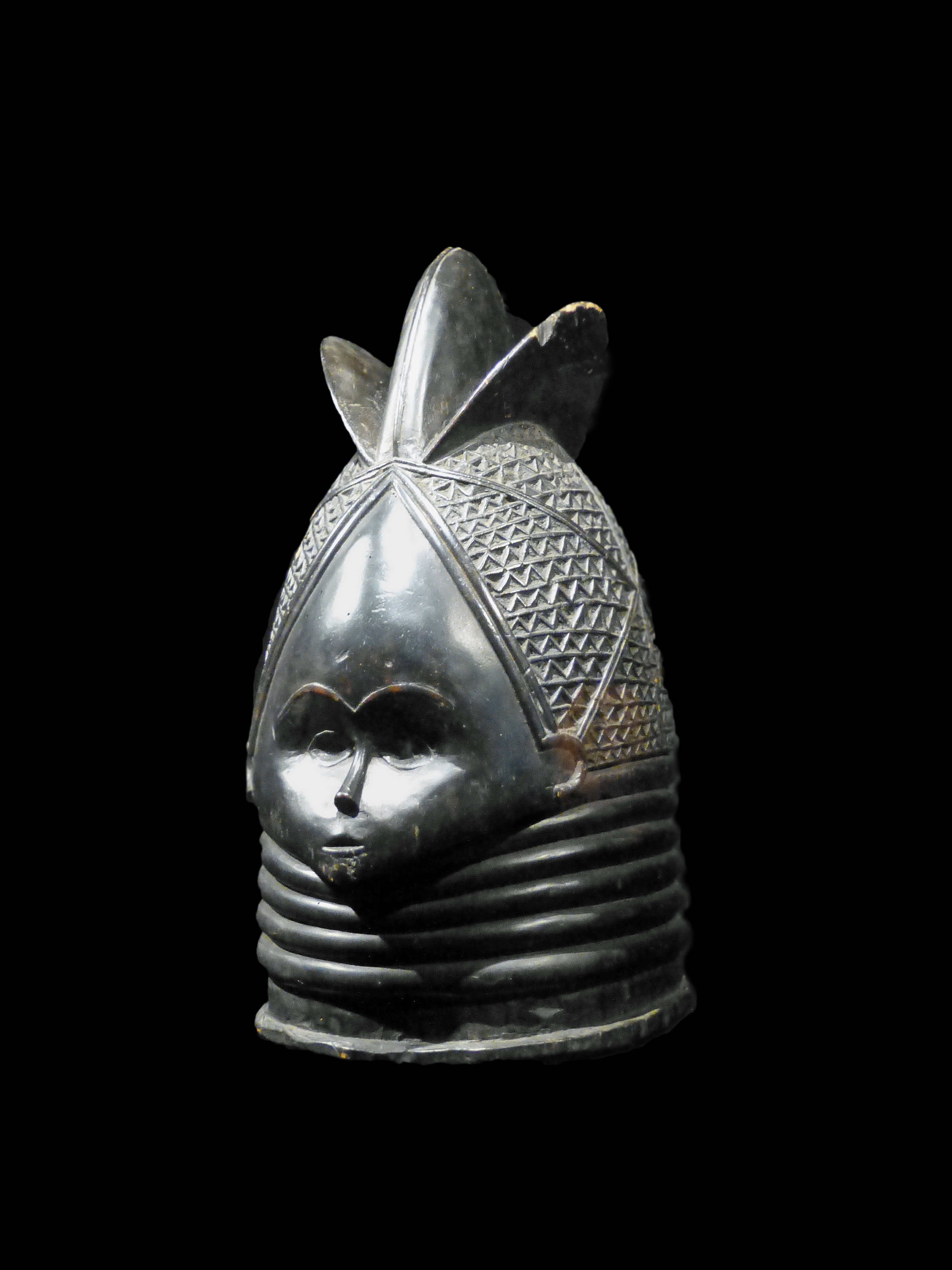 Masque de l'initiation du Sandé. Population Mendé. Sierra Leone. Bois. Musée du quai Branly. N° d'inventaire : 73.1996.14.1 [1]